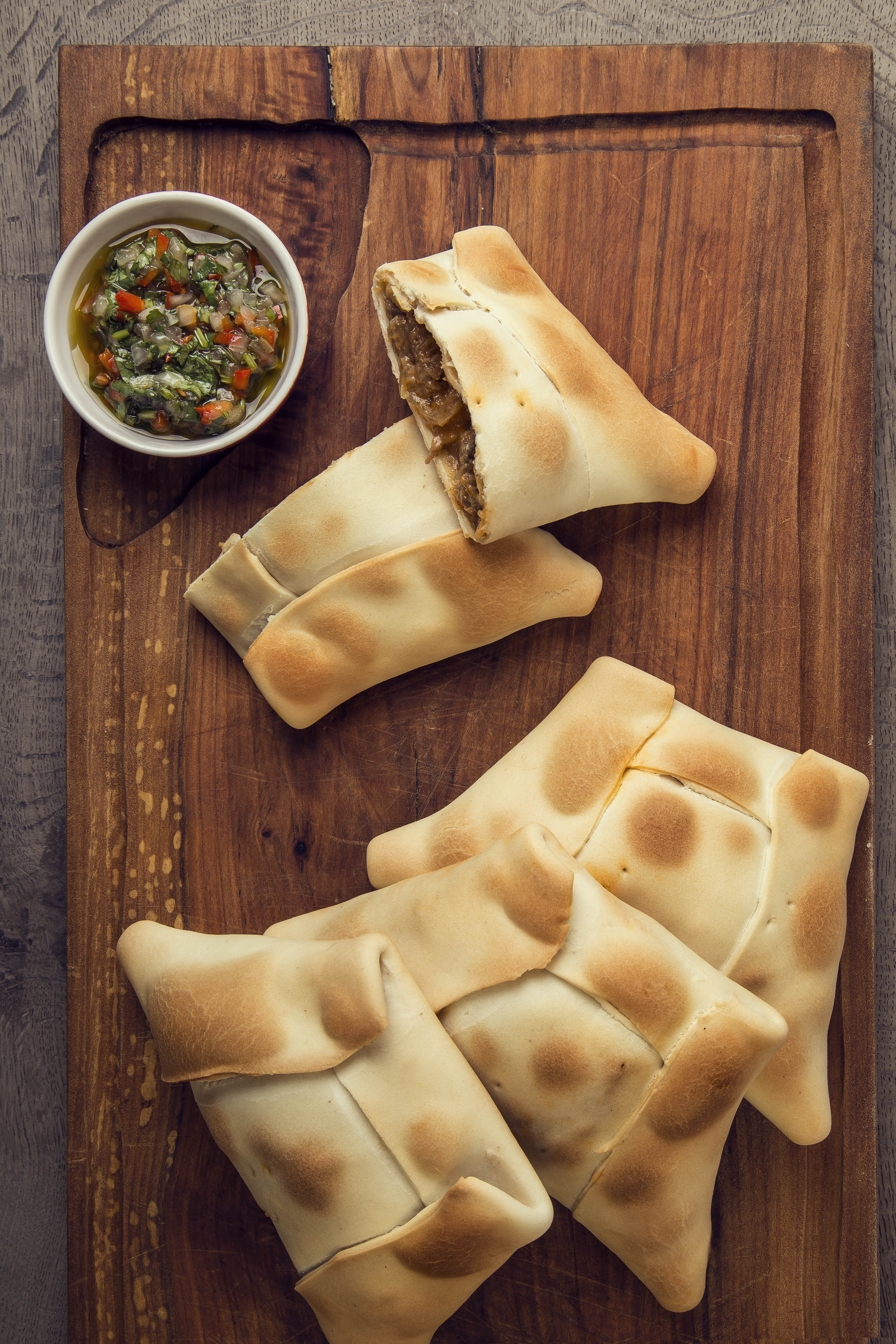 Empanadas Chilenas rellenas con pino, el cual consiste en Carne de vaca, cebolla, condimentos típicos locales. Huevo duro, aceituna y pasas. Acompañadas de un típico pebre chileno, hecho con ají cebolla, tomate, cilantro. y condimentos.